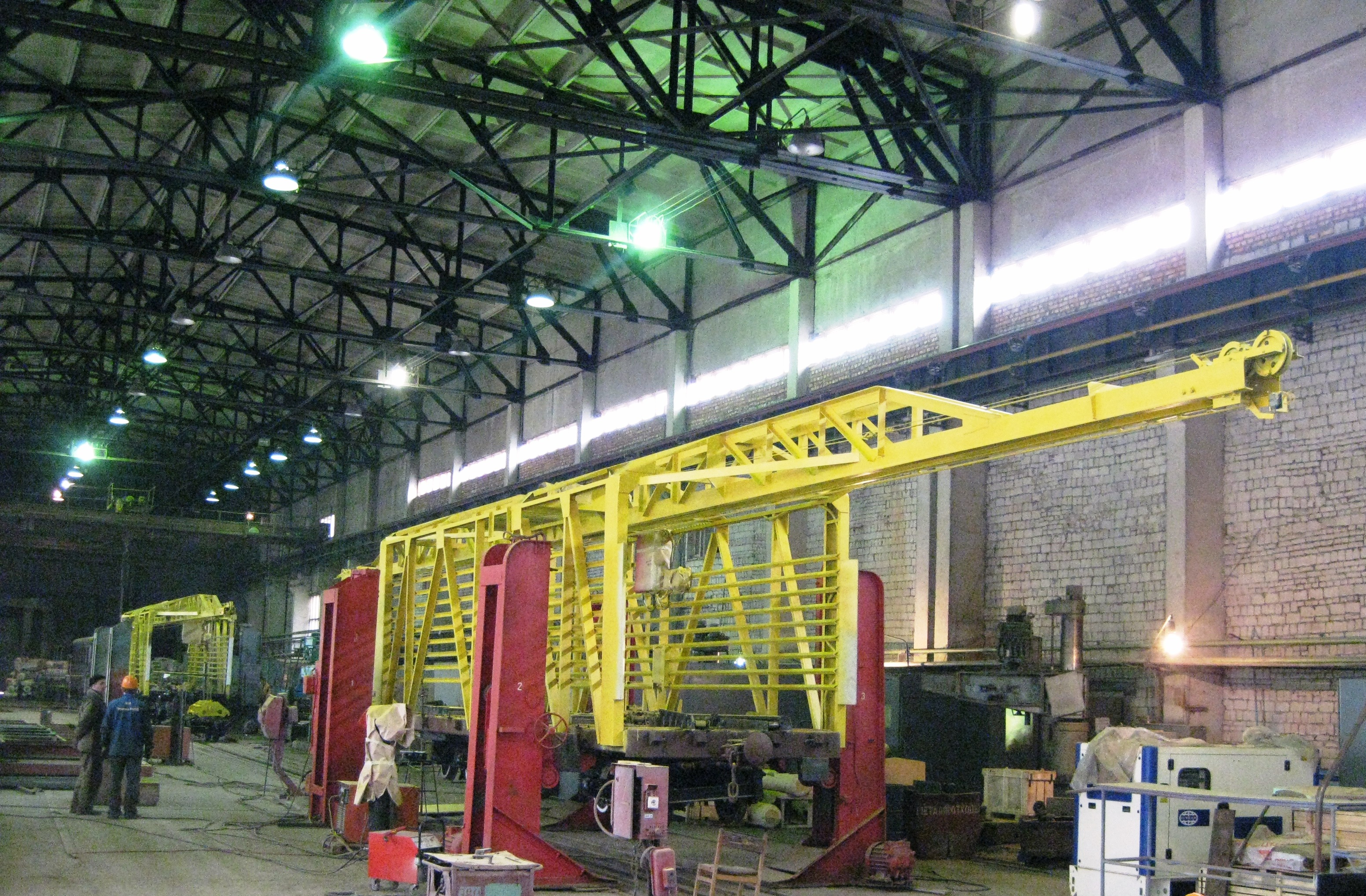 Строительно-ремонтный поезд СПА.